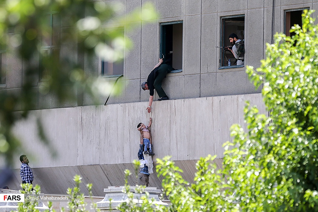 حمله گروه دولت اسلامی عراق و شام به مجلس شورای اسلامی